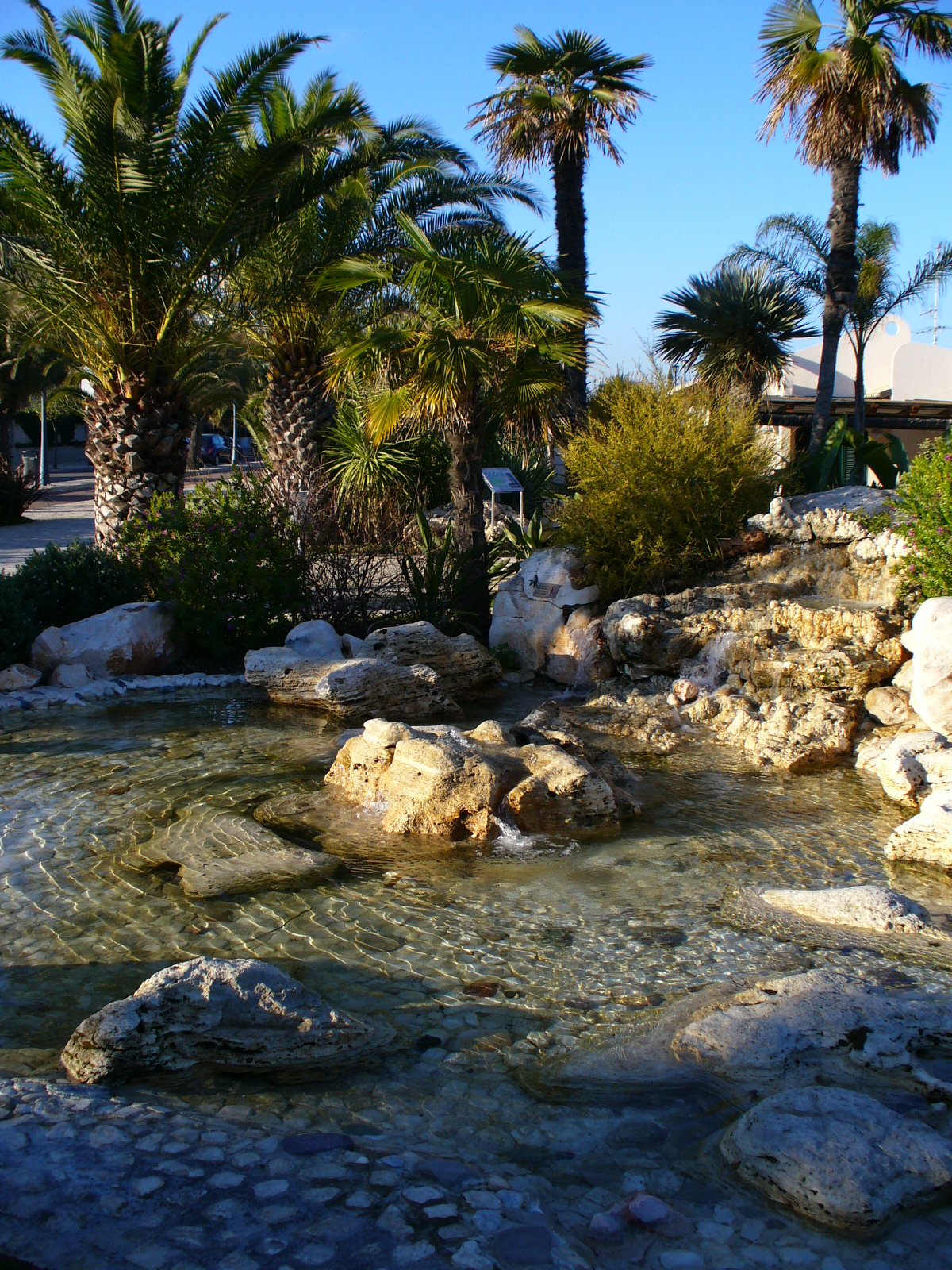 Uno dei giardini tematici del lungomare Sud. Una delle tante "oasi" che caratterizzano il nuovo arredo del lungomare sud di San Benedetto del Tronto.